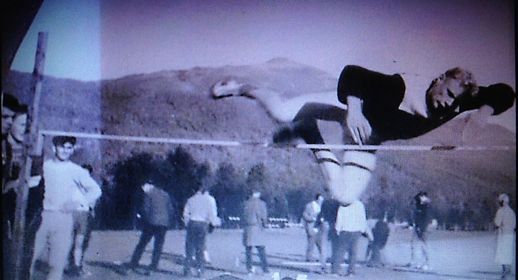 Vidkunn Haugli i svevet under høydehopp med tilløp.